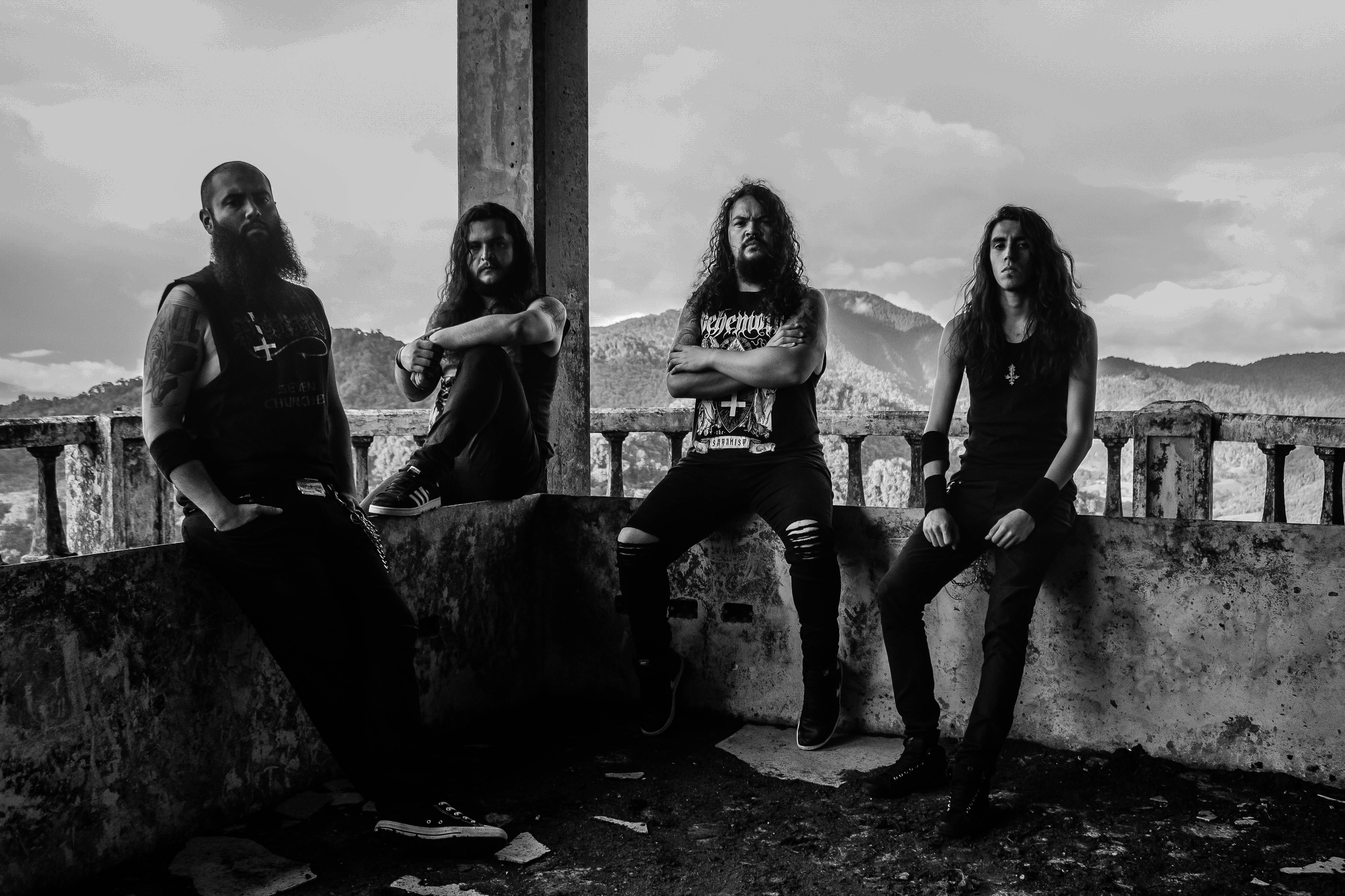 Heresy en Cartago, Costa Rica